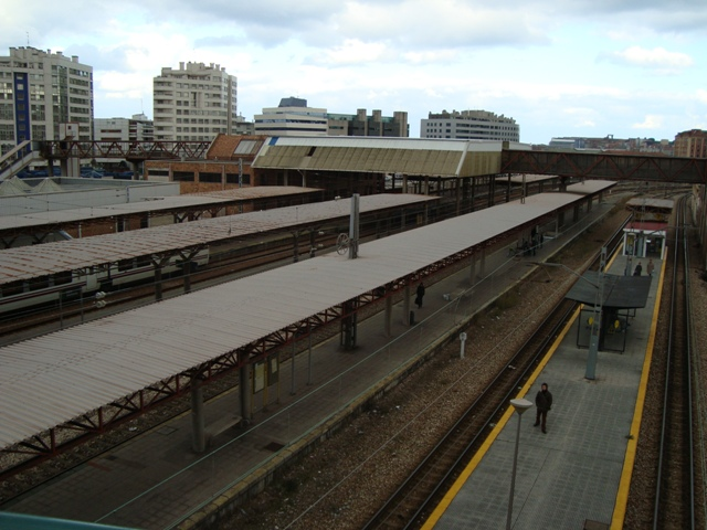 Vista de los andenes, vías y marquesinas de la estación de Jovellanos.